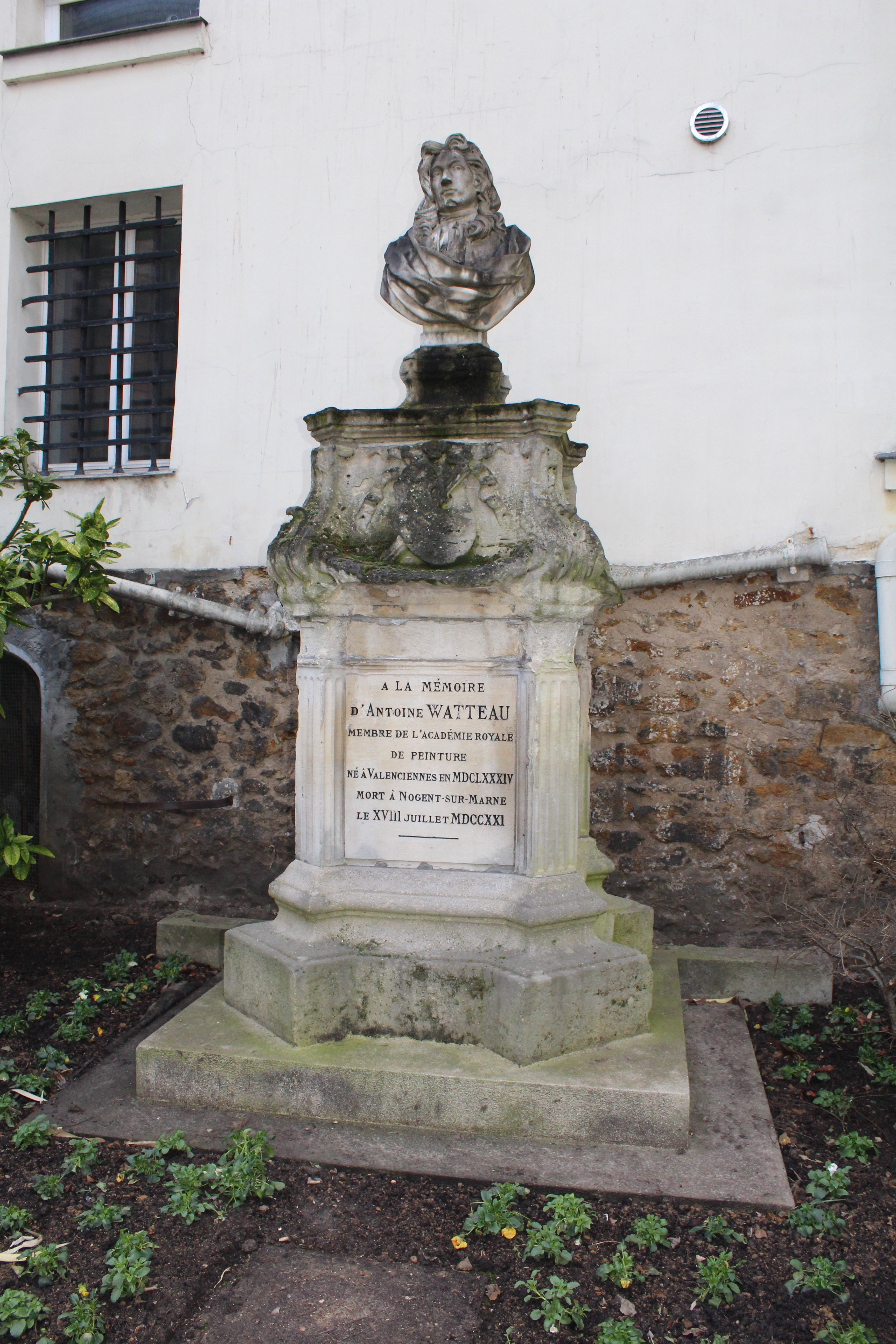 Monument en l'honneur à Antoine Watteau à Nogent-sur-Marne près de l'église Saint-Saturnin.